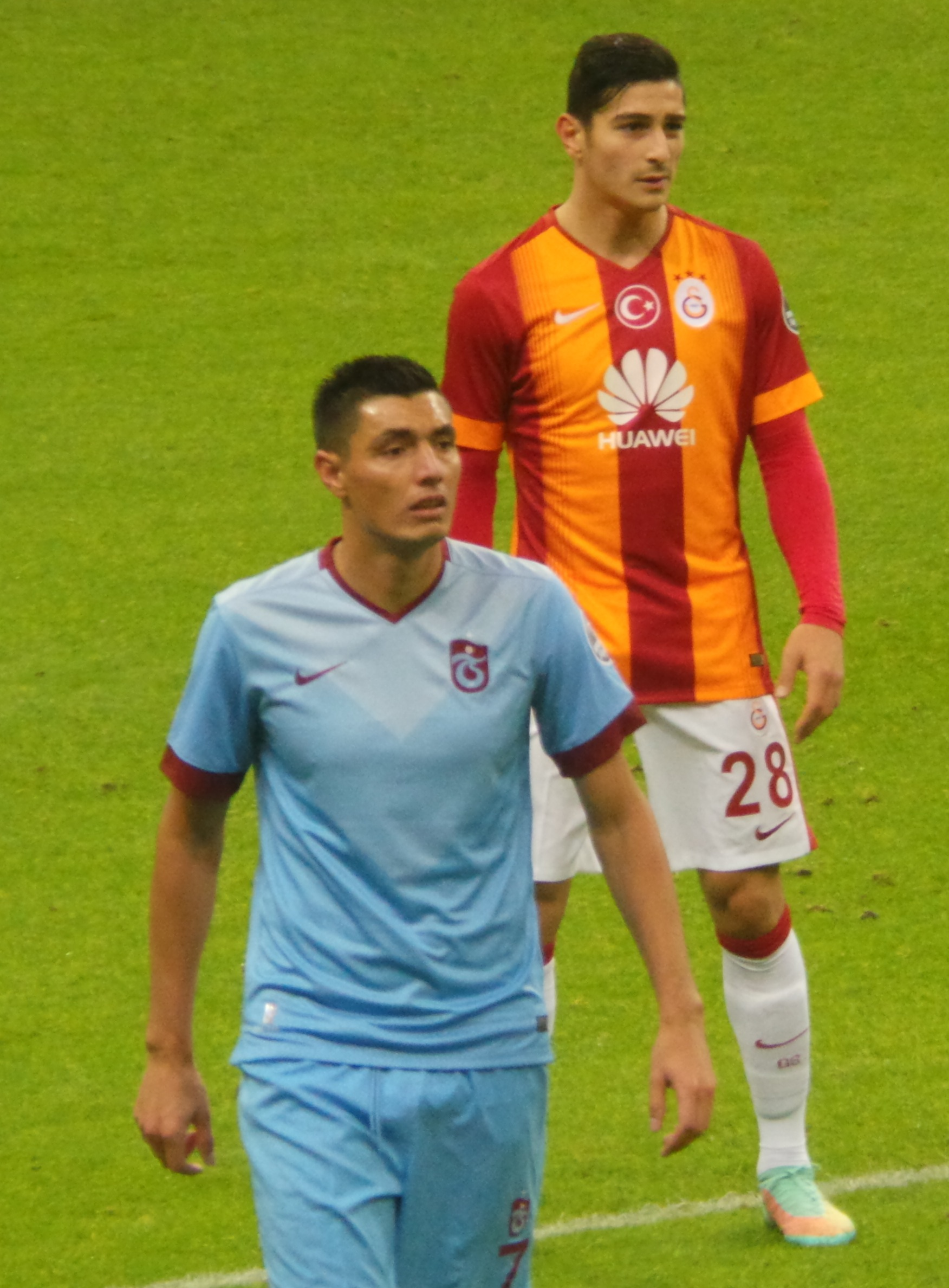 Koray Günter ve Oscar Cardozo Galatasaray-Trabzonspor müsabakasında